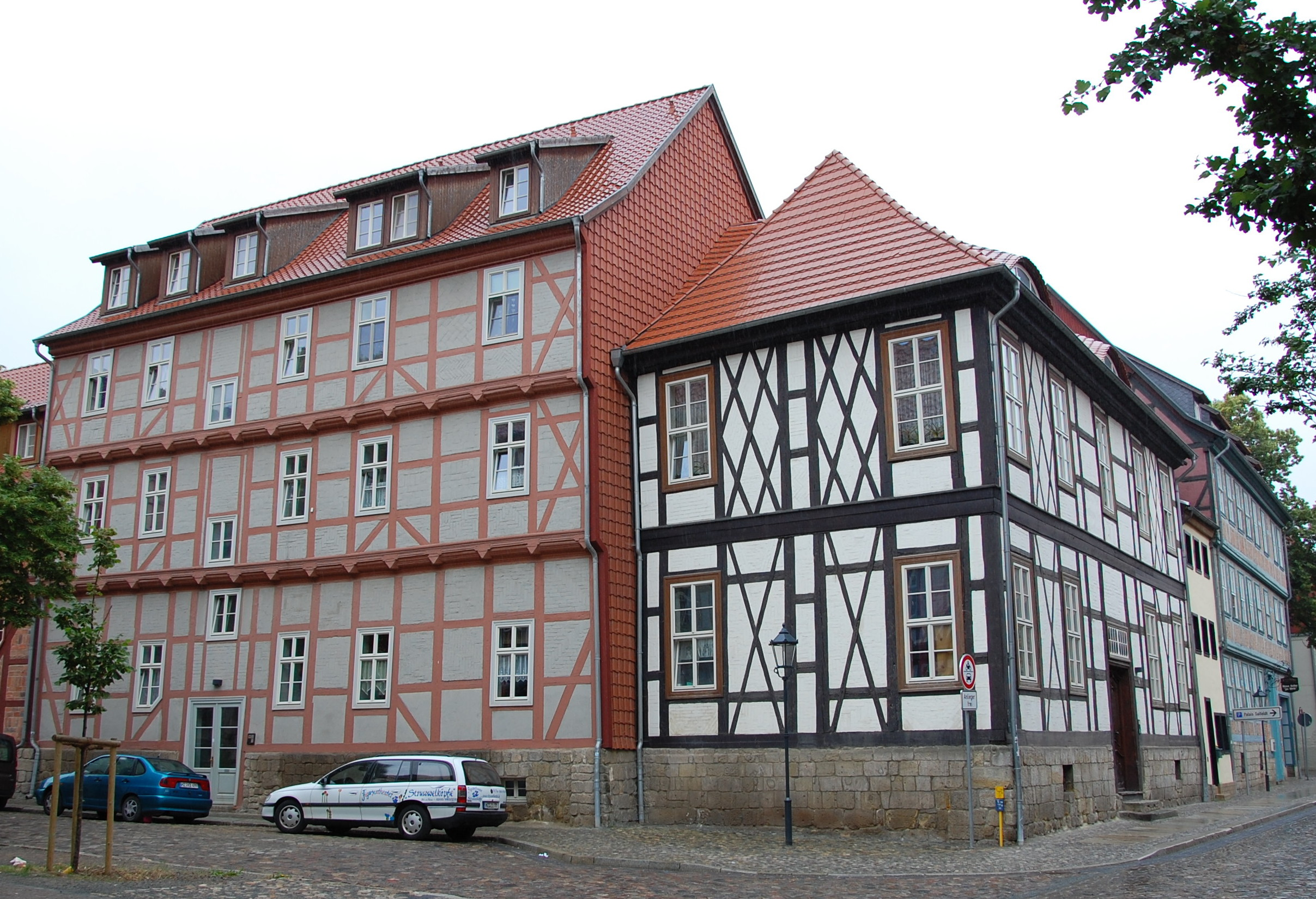 Nordseite des Hauses Breite Straße 35 in Quedlinburg